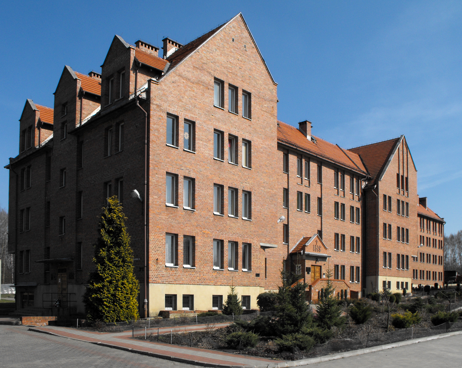 Parafia MB Kochawińskiej - dom zakonny, widok od strony kościoła